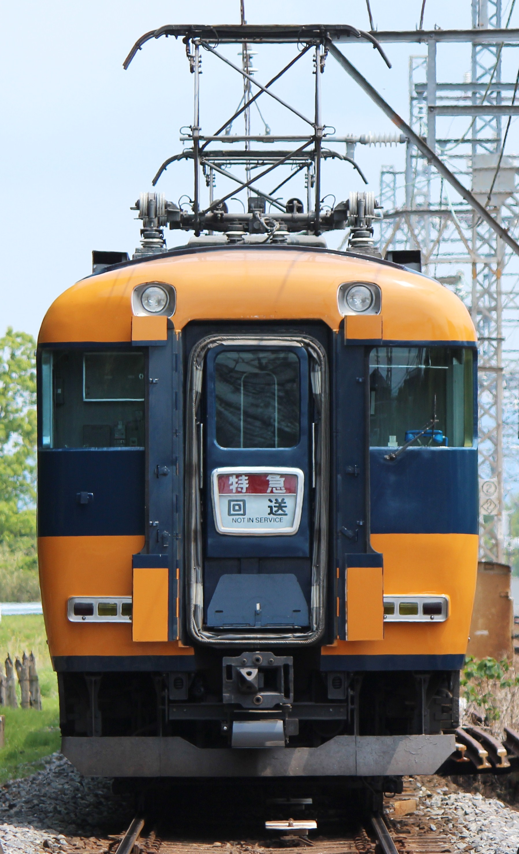 近鉄12200系 幌カバーが開いた状態